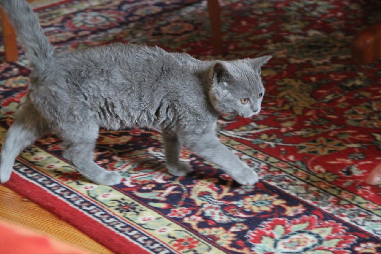 Beispiel für eine graue Selkirk-Rex-Katze